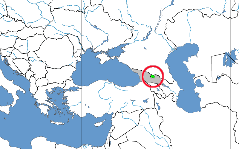 Ver Image:Location of South Ossetia in Europe.png